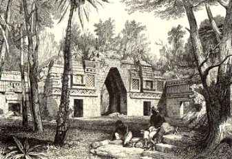 Arche de Labná, représentée par Catherwood en 1843, appartient au domaine public